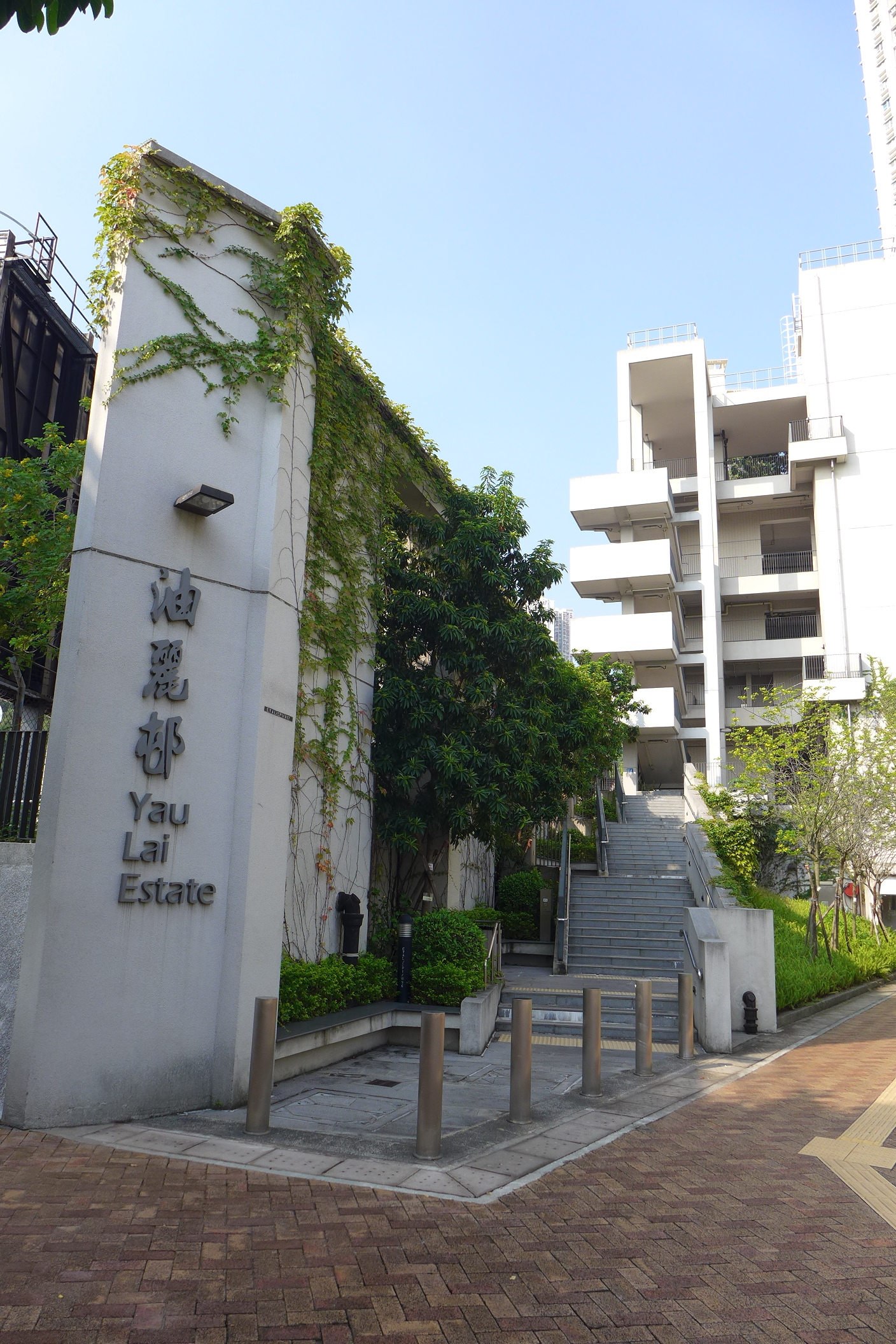 Yau Lai Estate Phase 5 Lift Tower